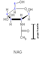 molecola di acetilglucosamina